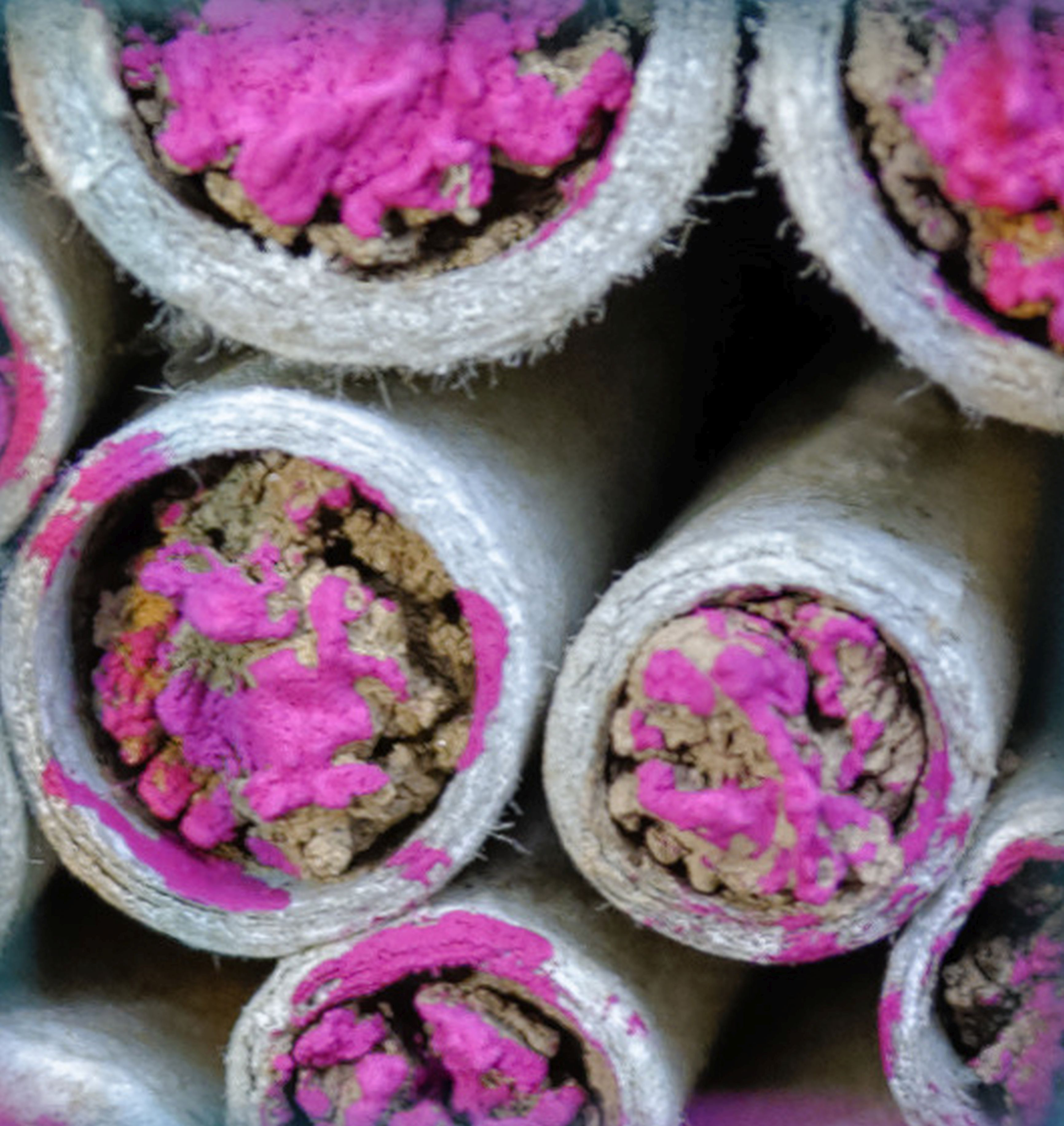 Bilder vom Insektenhotel